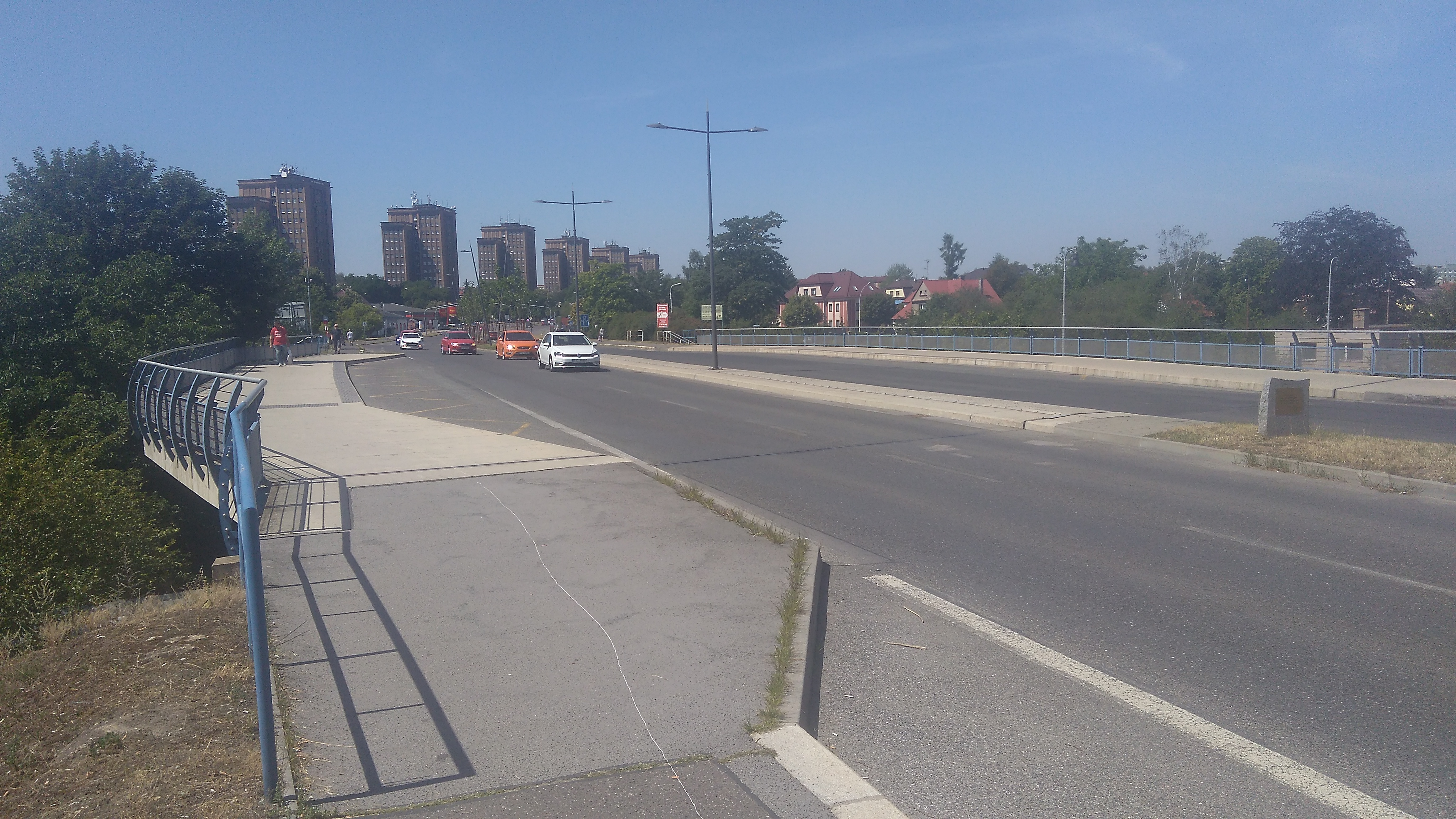 pohled z Rozdělovského mostu směrem na Rozdělov